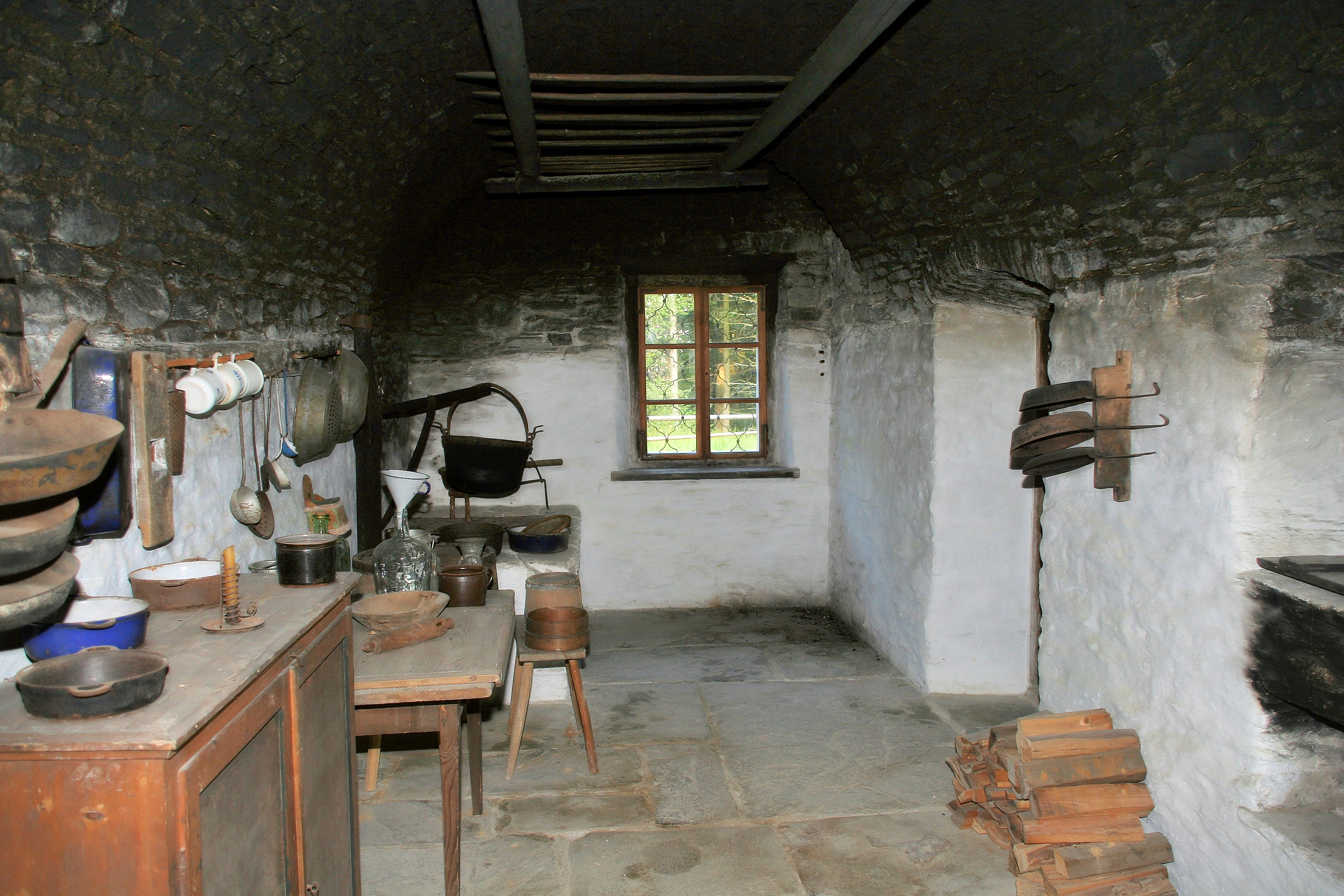 Rauchkuchl oder Schwarzkuchl im Abrahamhof aus St. Michael im Lungau, wieder aufgebaut im Freilichtmuseum Salzburg. In derartigen Küchen ohne Rauchabzug wurde nicht nur gekocht, sondern auf den oben zu erkenennden Gerüst auch gleichzeitig geräuchert.